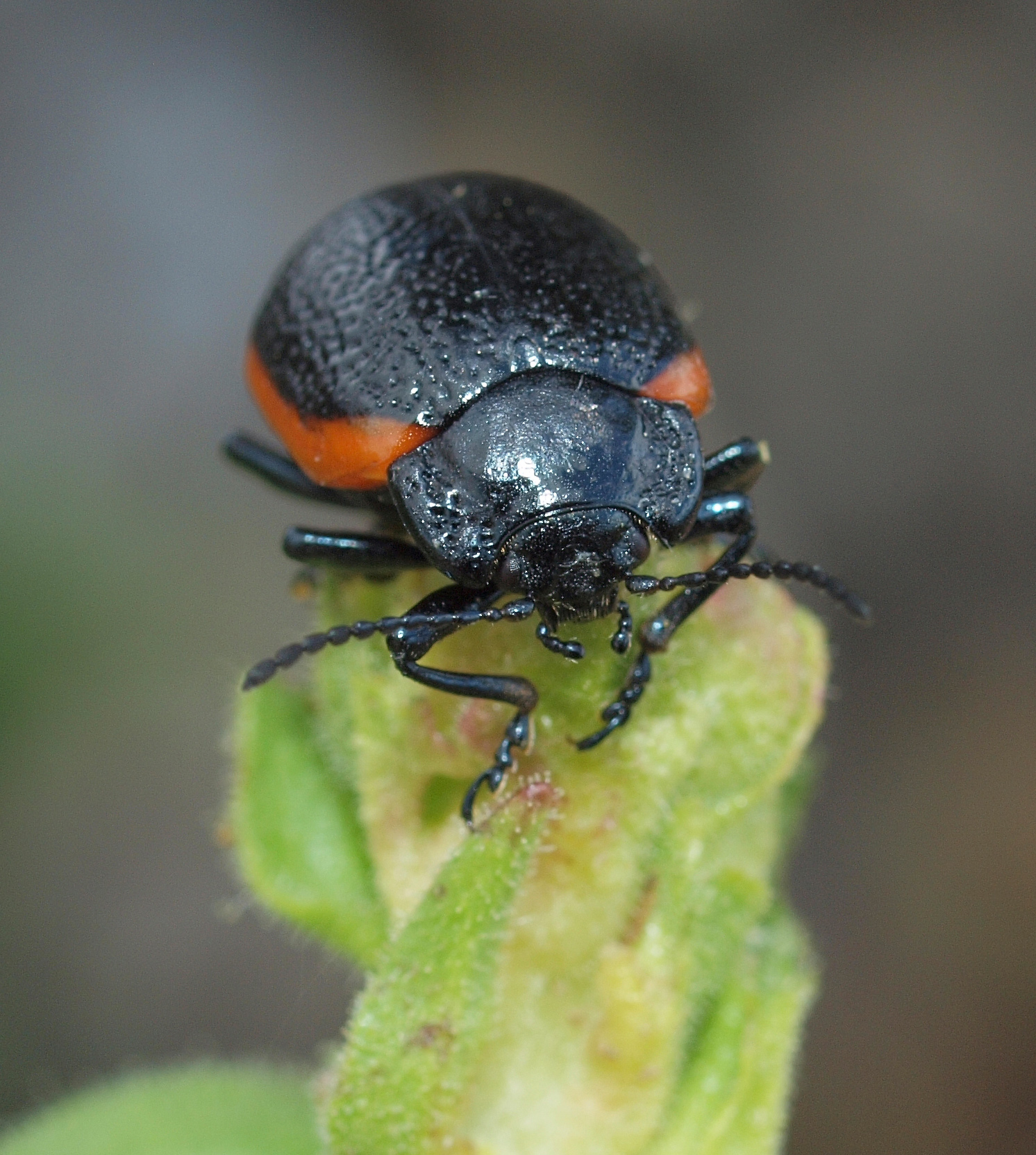 Chrysolina kuesteri subsp. friderici, sobre Antirrhinum graniticum. Losar de la Vera (Cáceres, España).